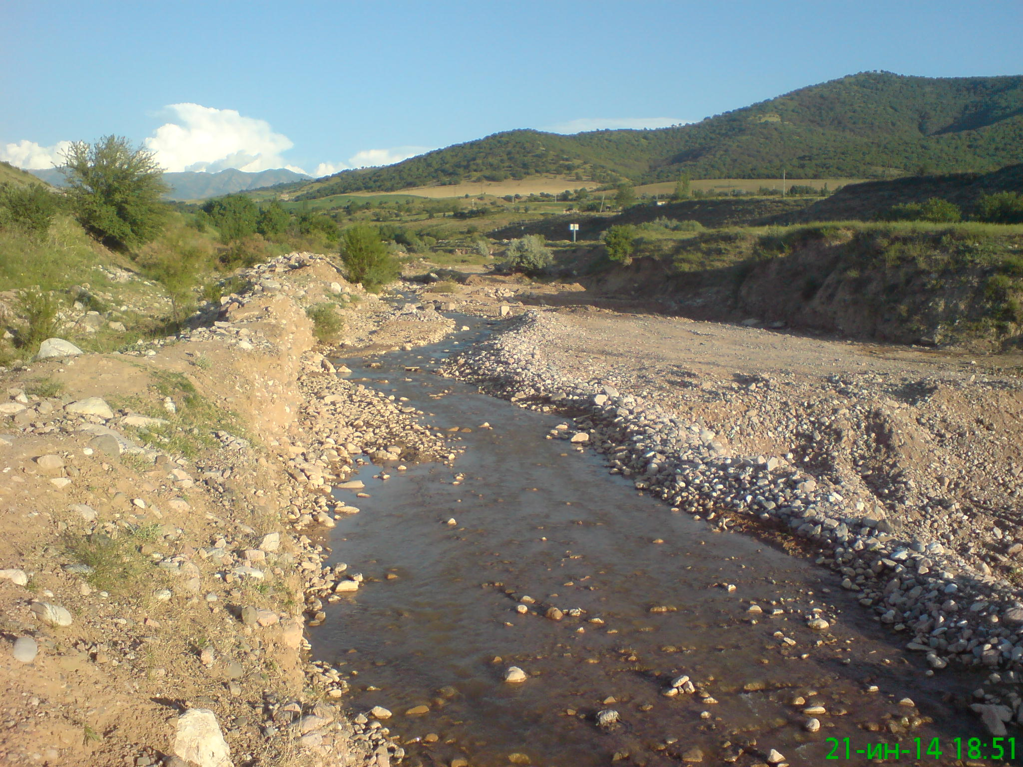 Река Гальвасай перед пересечением с автодорогой Р-12, близ города Газалкент, Ташкентский вилоят, Узбекистан